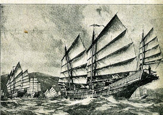 Flottille de jonques chinoises introduisant des approvisionnements à Port Arthur